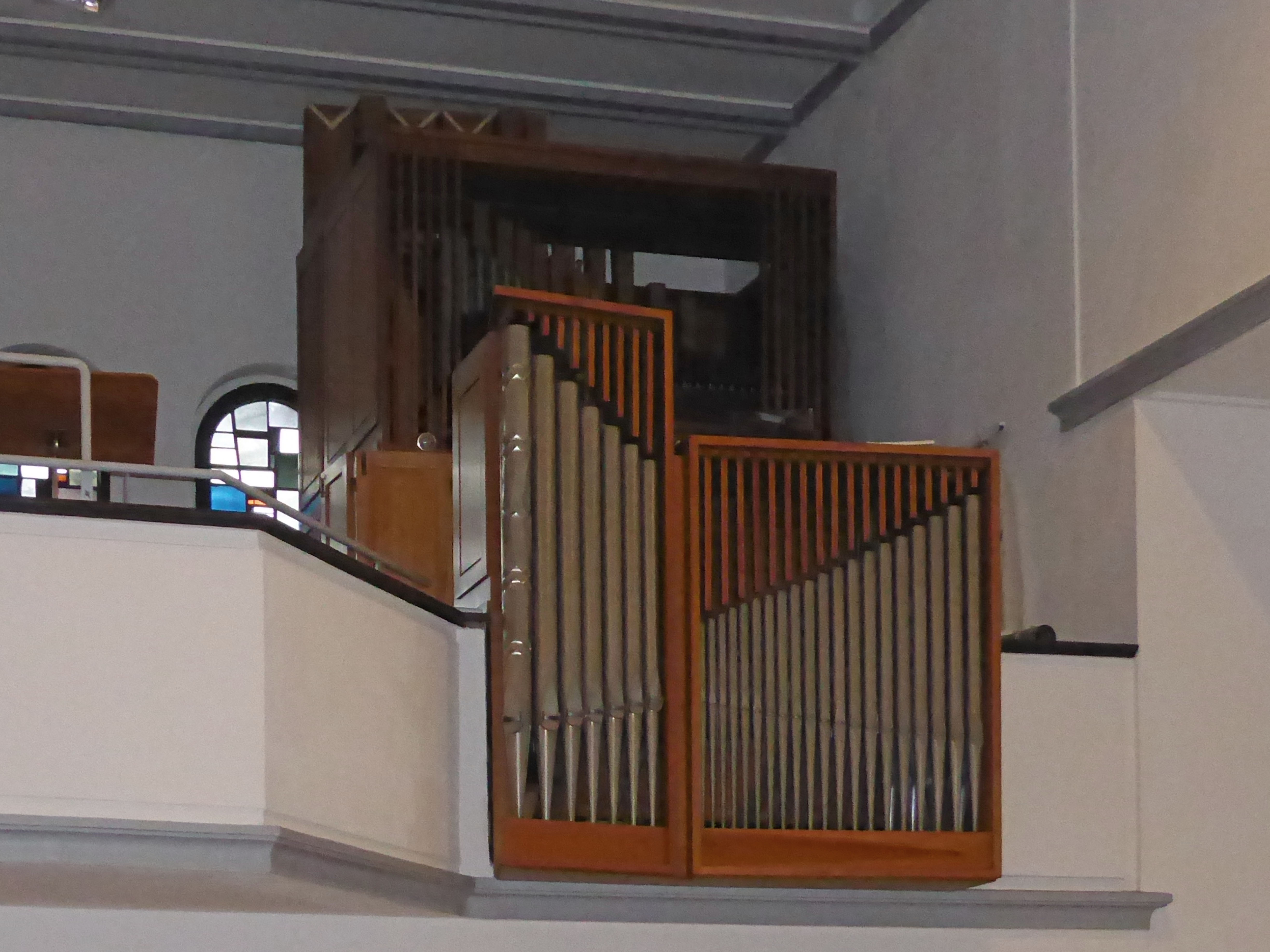 Orgel Inder katholischen St.-Michael-Kirche in Vorsfelde, Stadtteil von Wolfsburg.